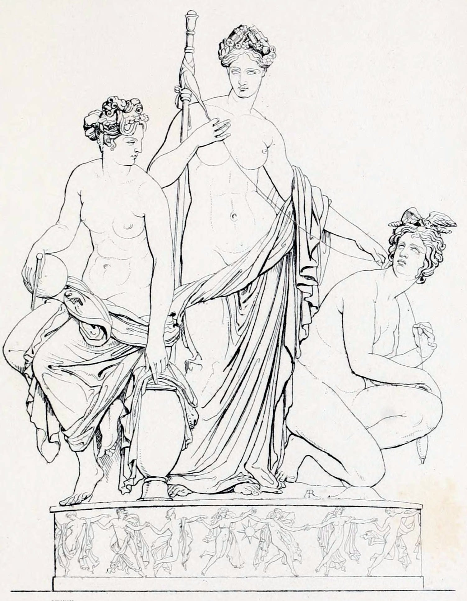 Les Parques. Lachesis est assise près d'une urne et tient une sphère. Clotho, debout au centre, tient la quenouille des destinées. Atropos s'apprête à couper le fil.